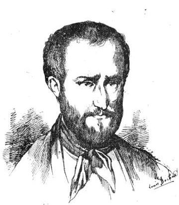 "Auguste Blanqui"